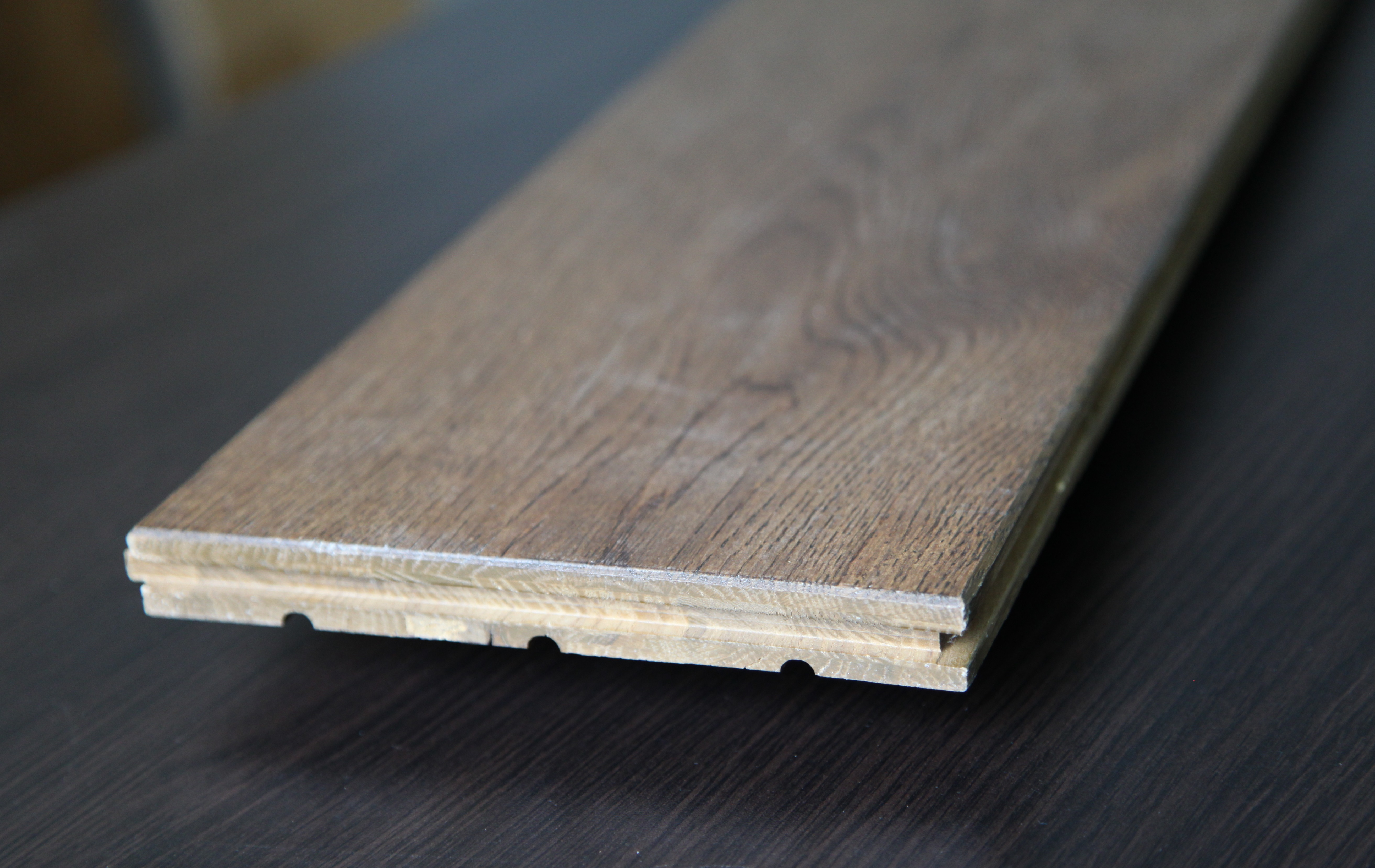 Супермассив. Внешний вид и конструкция.